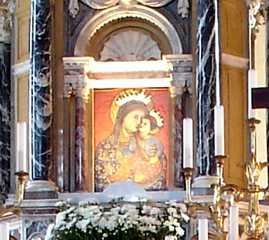 Immagine della Madonna venerata nel Santuario delle Grazie (Curtatone)